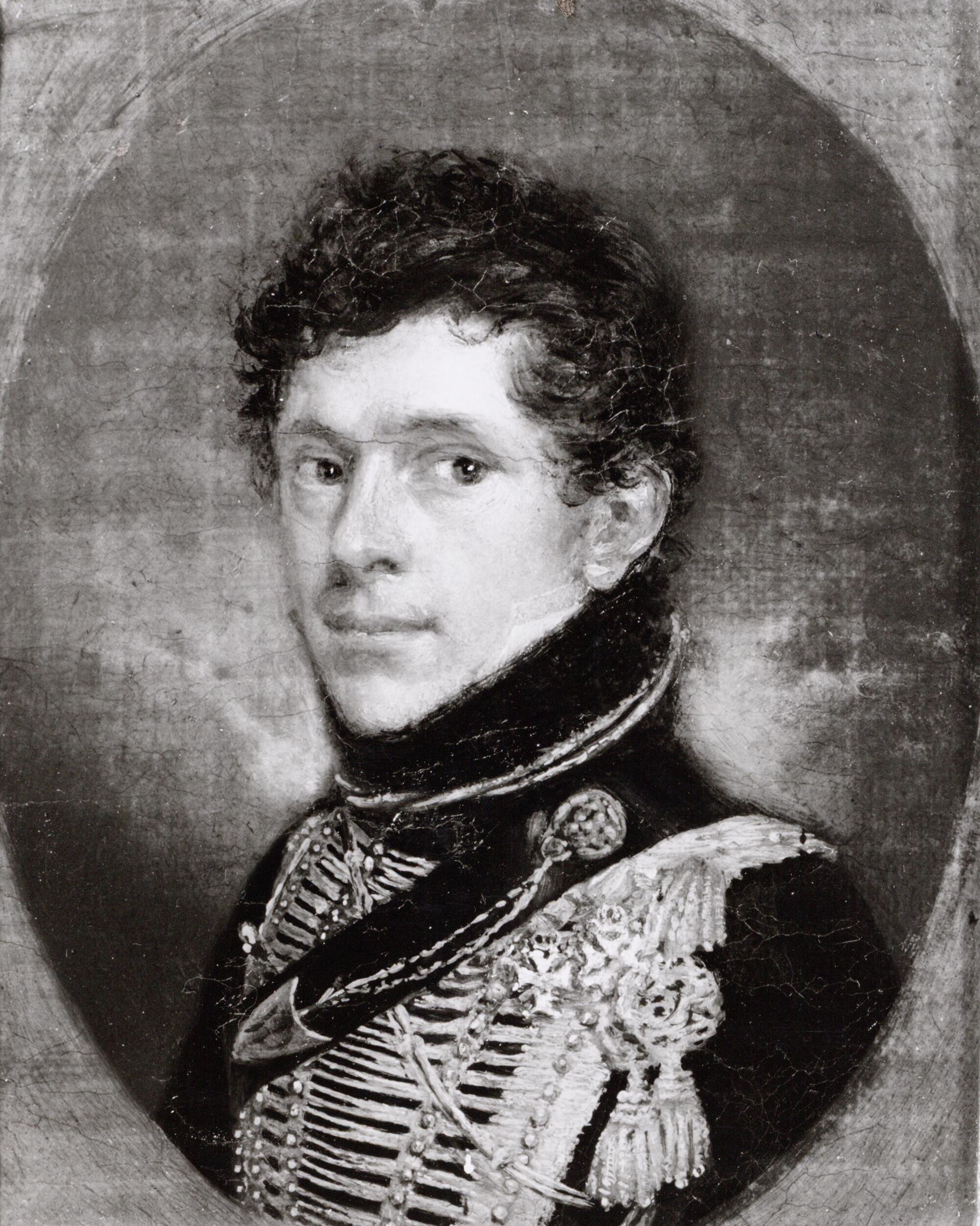 Vincent Maximiliaan van Tuyll van Serooskerken (* 14. August 1747 in Ütrecht; † 19. August 1794 bei Pont Sainte Maxence sur Oise) niederländischer Oberstleutnant